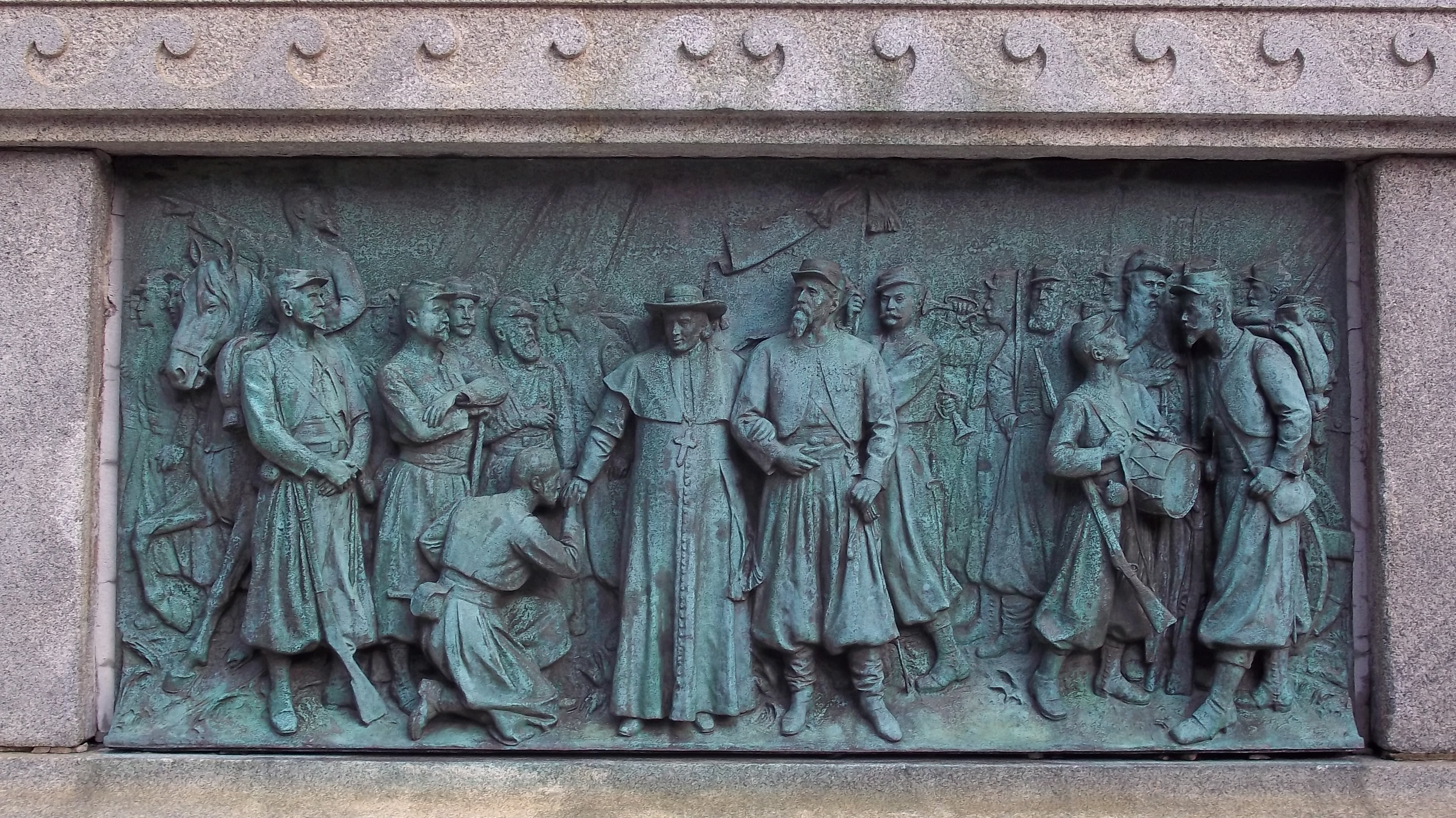 Monument à Ignace Bourget, situé devant la Basilique-cathédrale Marie-Reine-du-Monde, boulevard René-Lévesque Ouest, Montréal